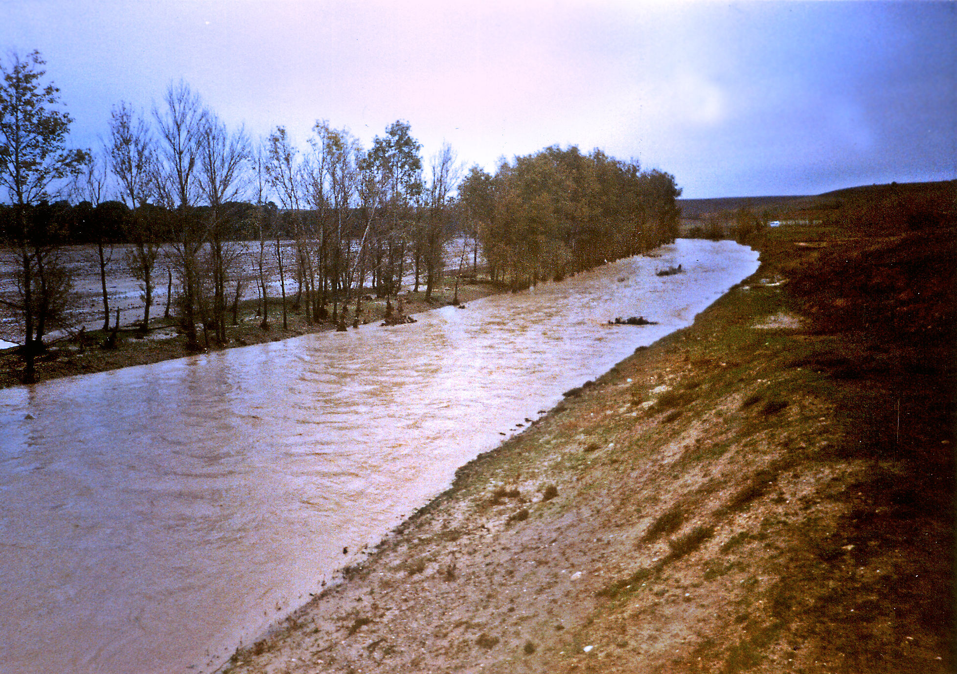 Crecida del río Trabancos, afluente del Duero